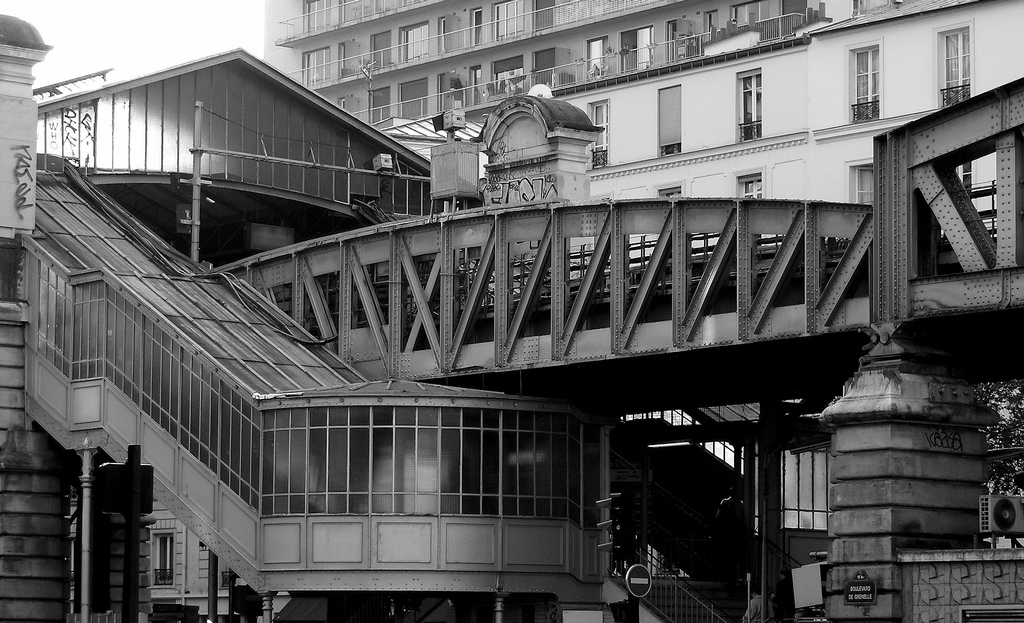 Metro de Paris Ligne 6 station La Motte Piquet